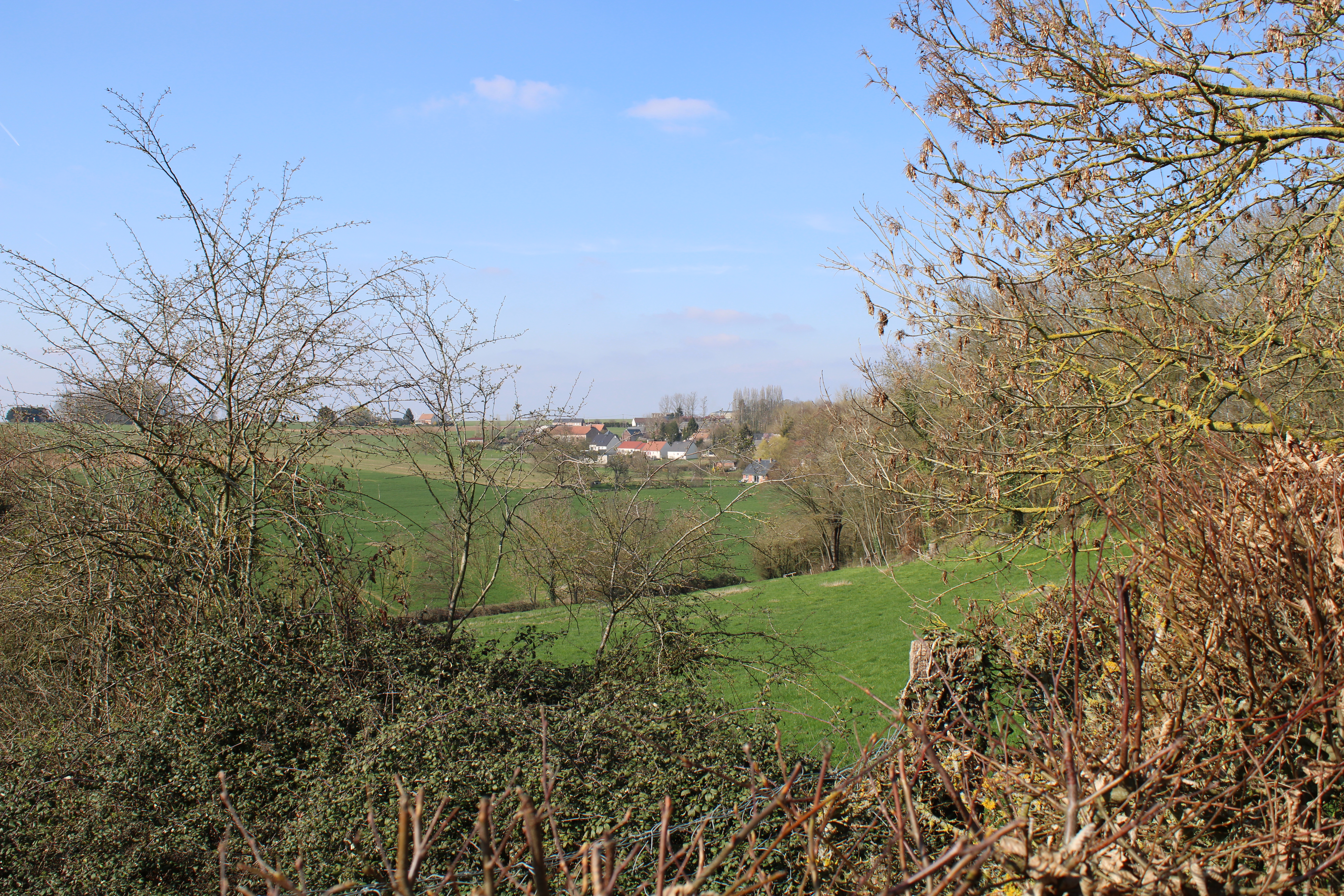 Panorama du village depuis l'église de Berlancourt.